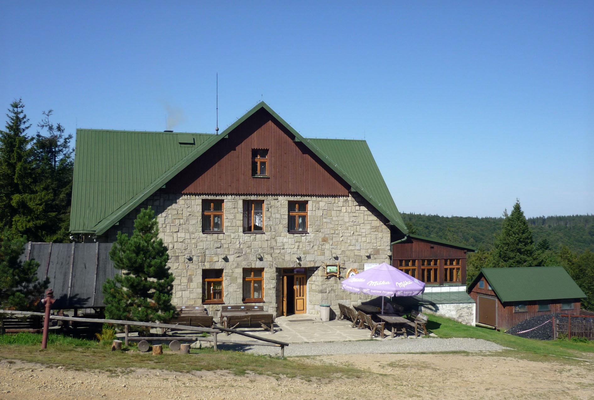 PTTK-Baude unterhalb des Klimczok (1034 m)